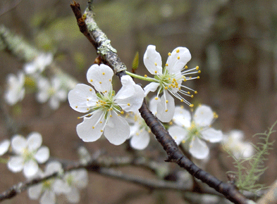 Hog-Plum